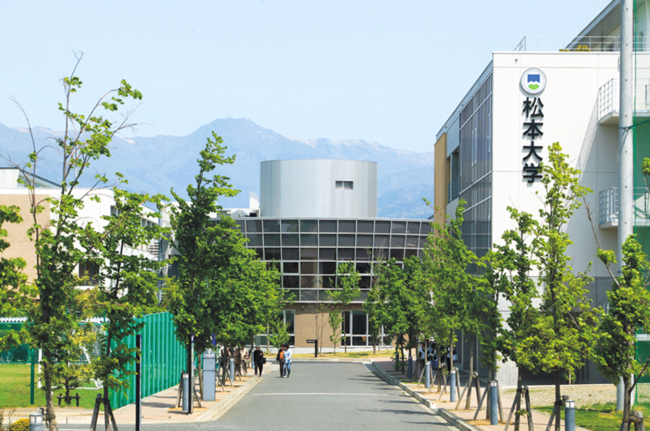 松本大学 正面入口